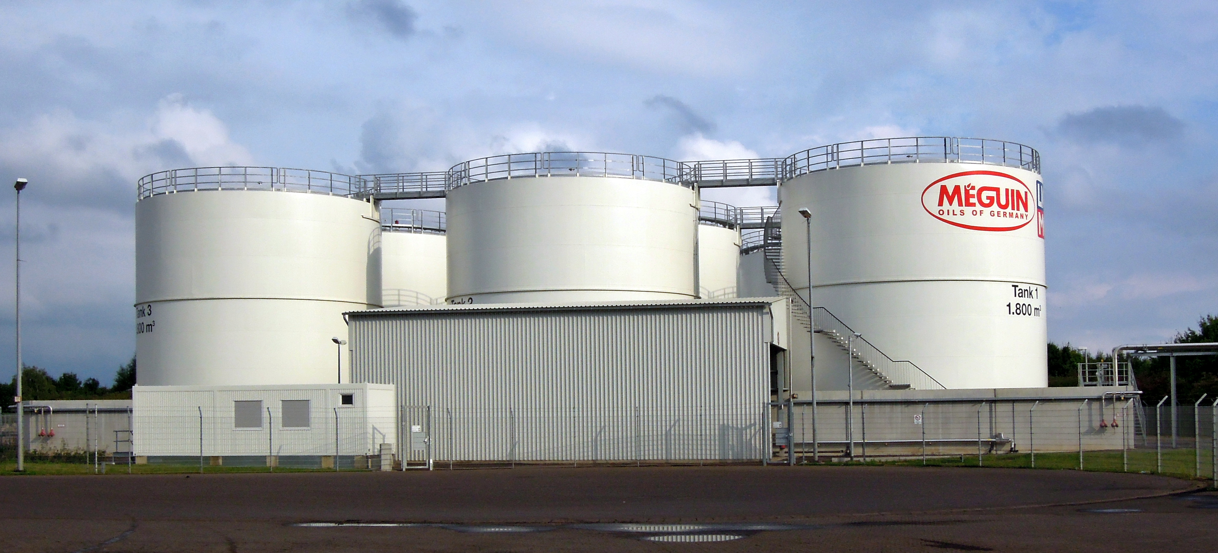 Öltanks Meguin